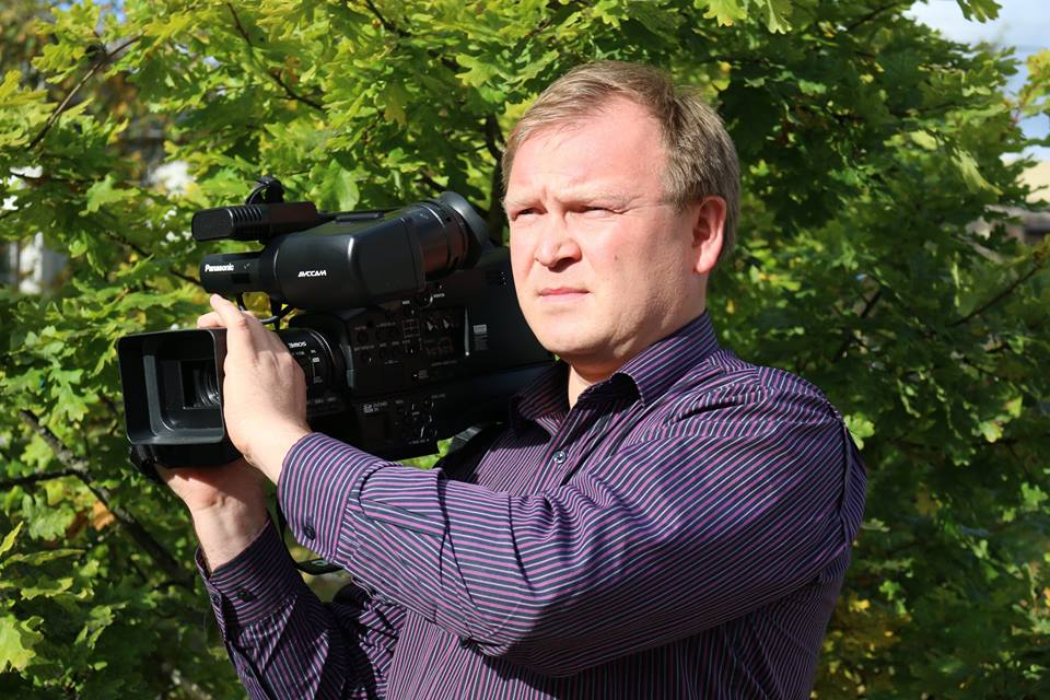 Олык марий: Кинорежиссер